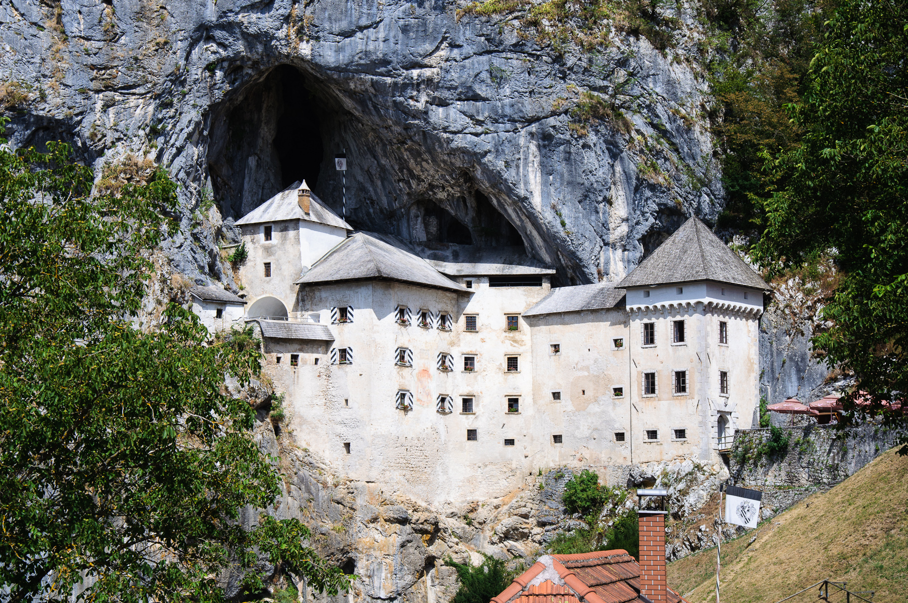 Predjama castle